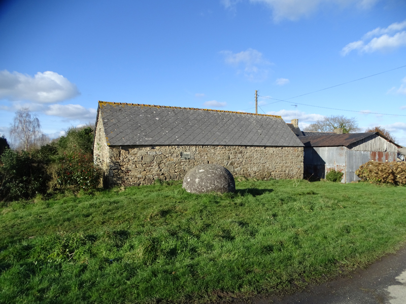 Louergad. Boul Sant-Mikael